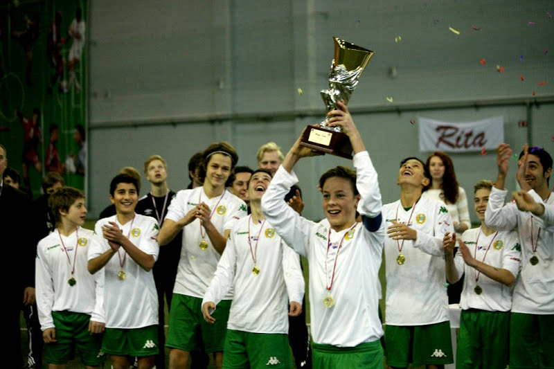 Победитель Riga Cup 2012 в возрастной группе U-15